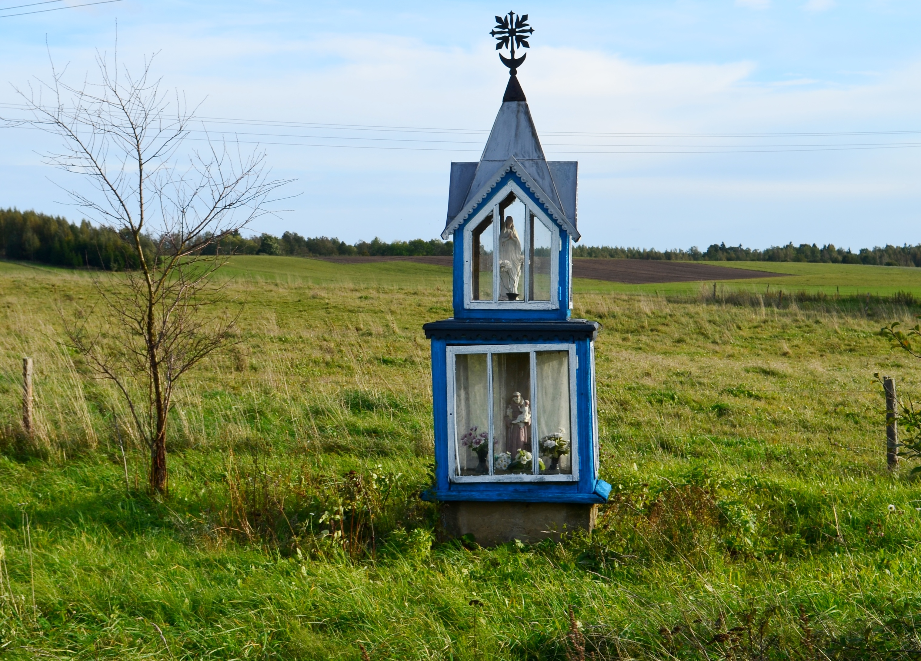 Koplytėlė, Skaborai, Rietavo sav.